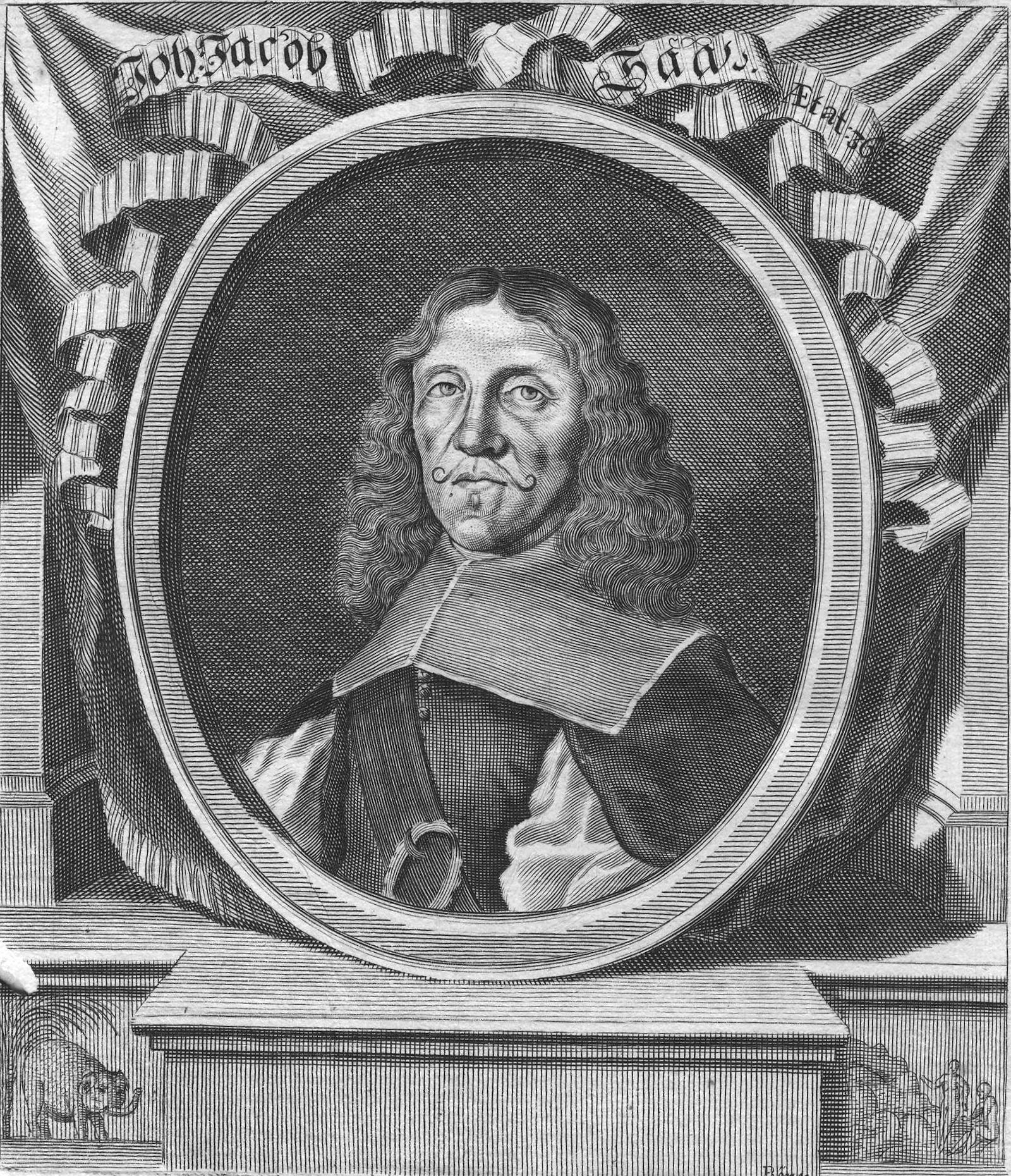 de: Dies ist ein Scan des historischen Buches: en: This is a scan of the historical document: Title: Johann Jacob Saar: Ost-Indianische Funfzehen-Jährige Kriegs-Dienste